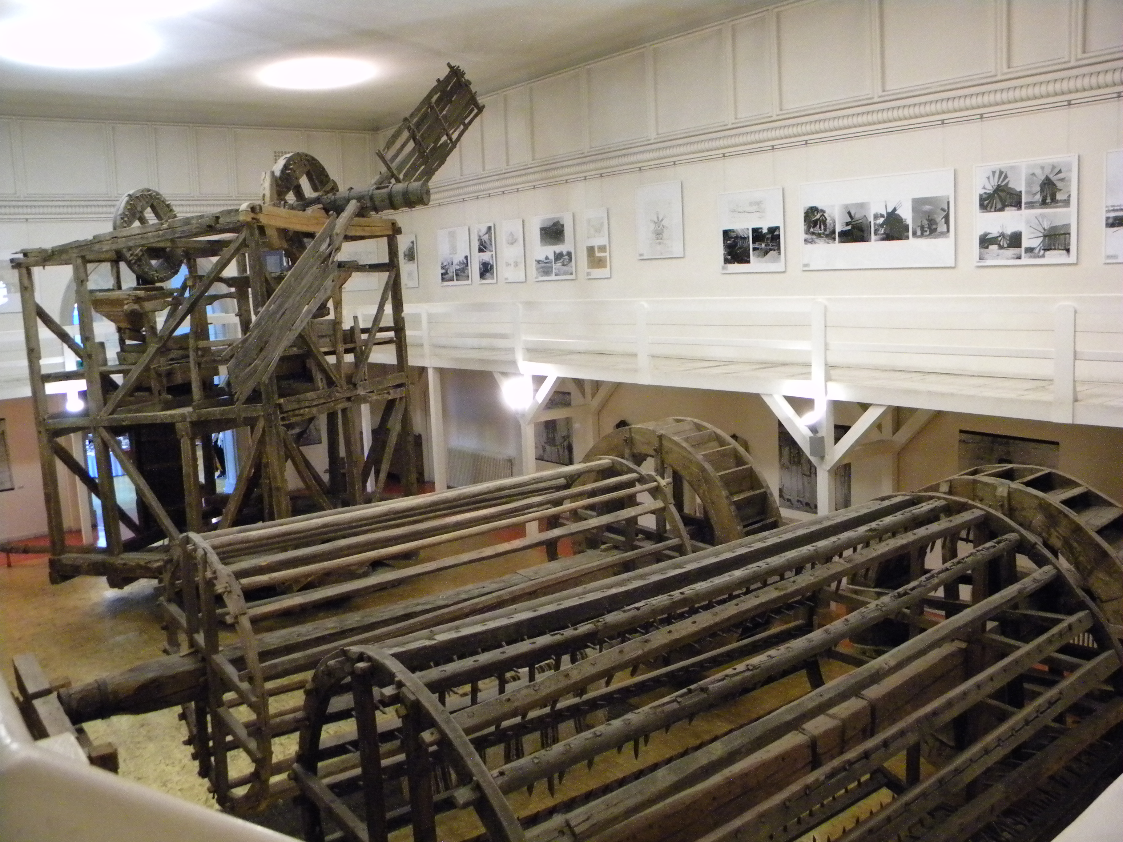 Bucuresti, Romania, Muzeul Taranului Roman (interior 35)(moara); B-II-m-A-18985